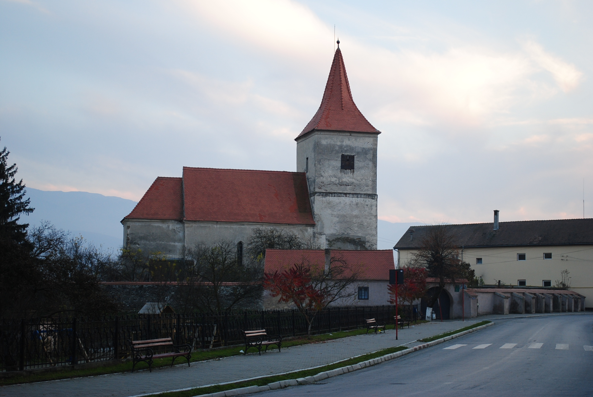 Ansamblul bisericii evanghelice fortificate Avrig, sec. XI - XVI